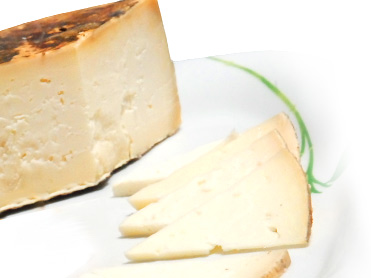 Queso Curado Puro de Cabra